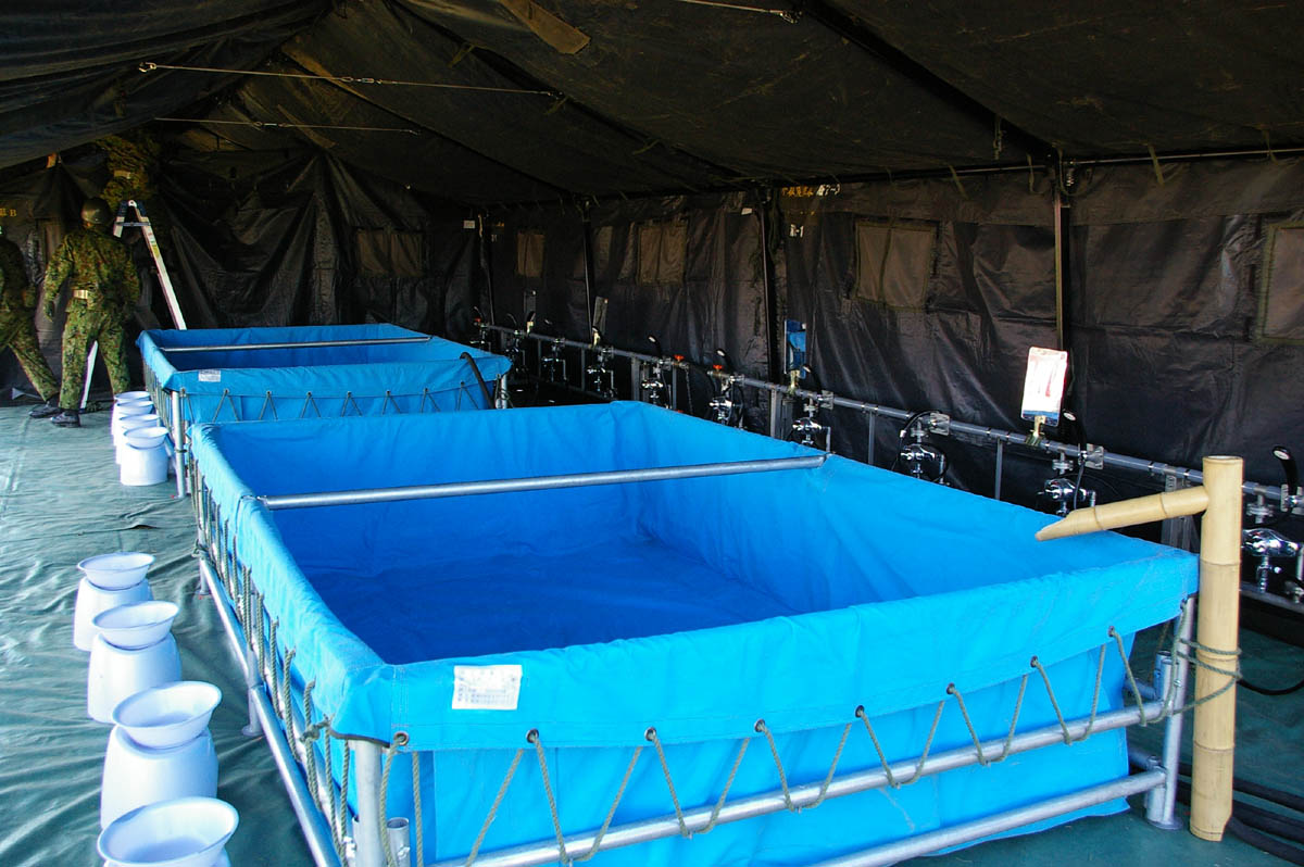 In Camp Matsudo,Japan. 野外入浴セット2型 2007年11月18日、松戸駐屯地で撮影。